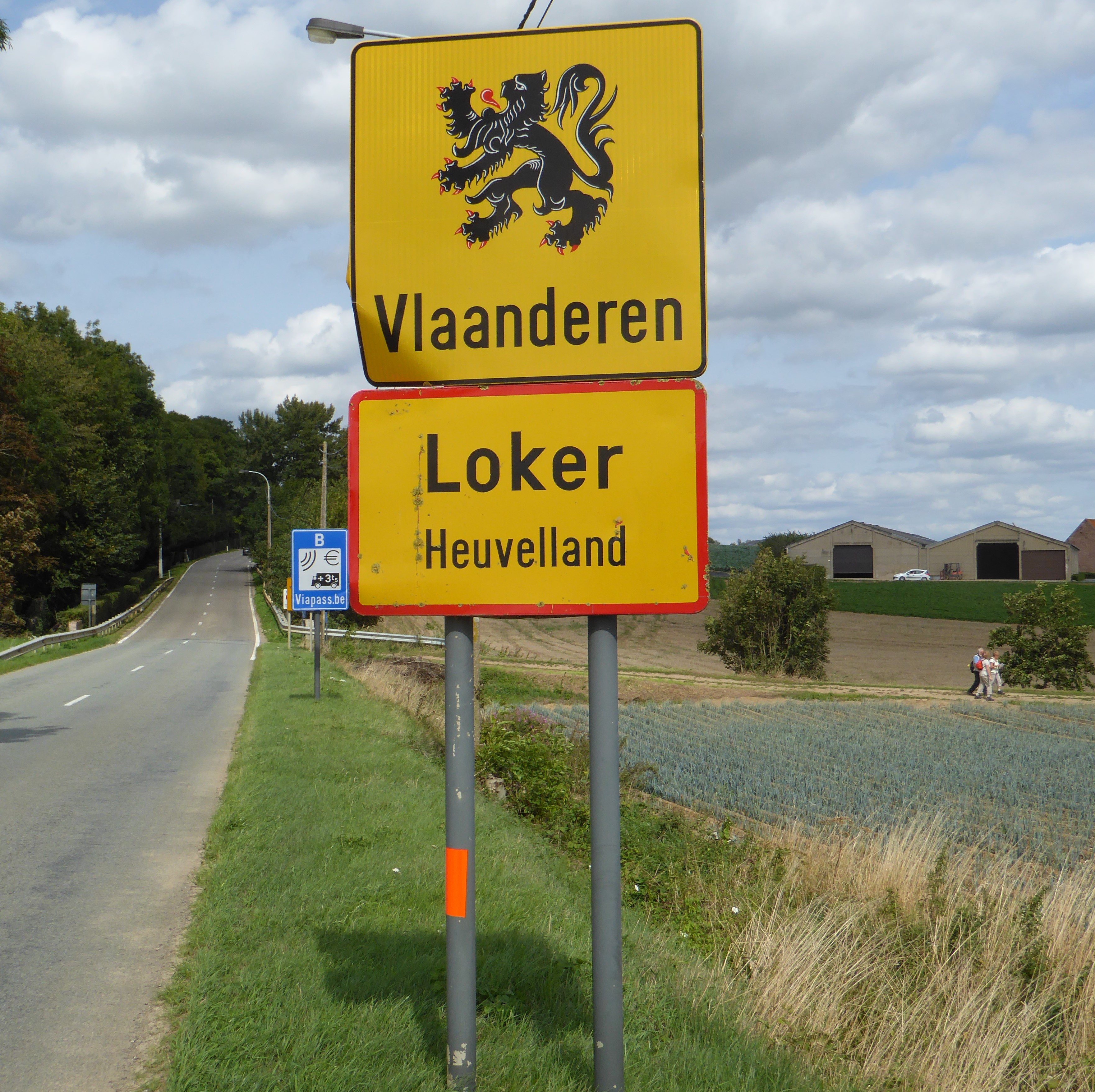 city limit Loker' , Heuvelland, West Flanders, Belgium